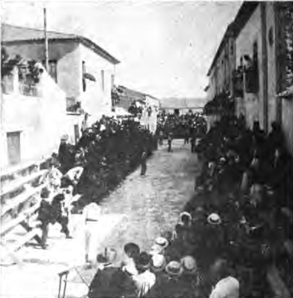 Novelda: Juego de pelota